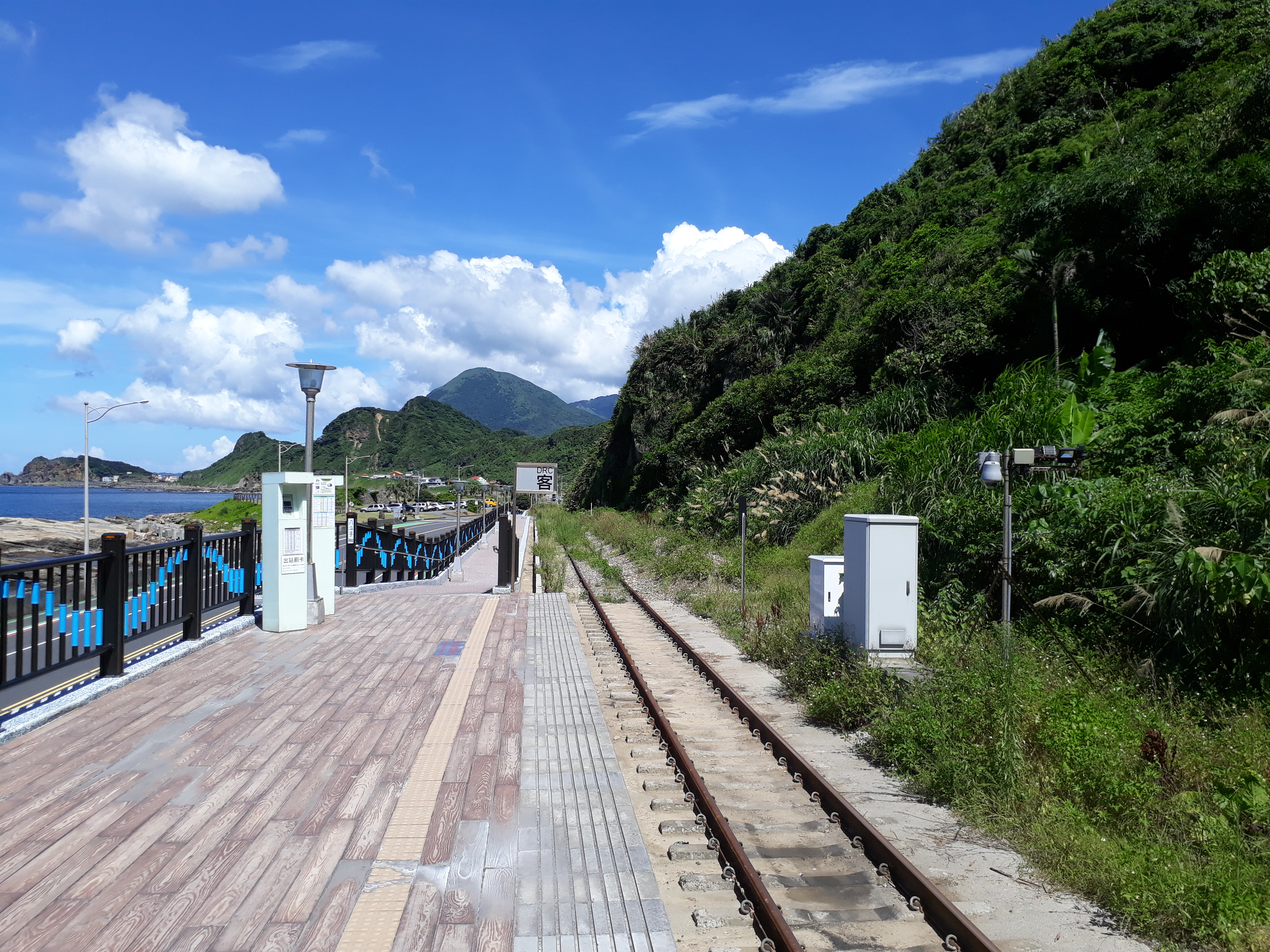 台灣鐵路管理局八斗子車站月台西側鐵軌